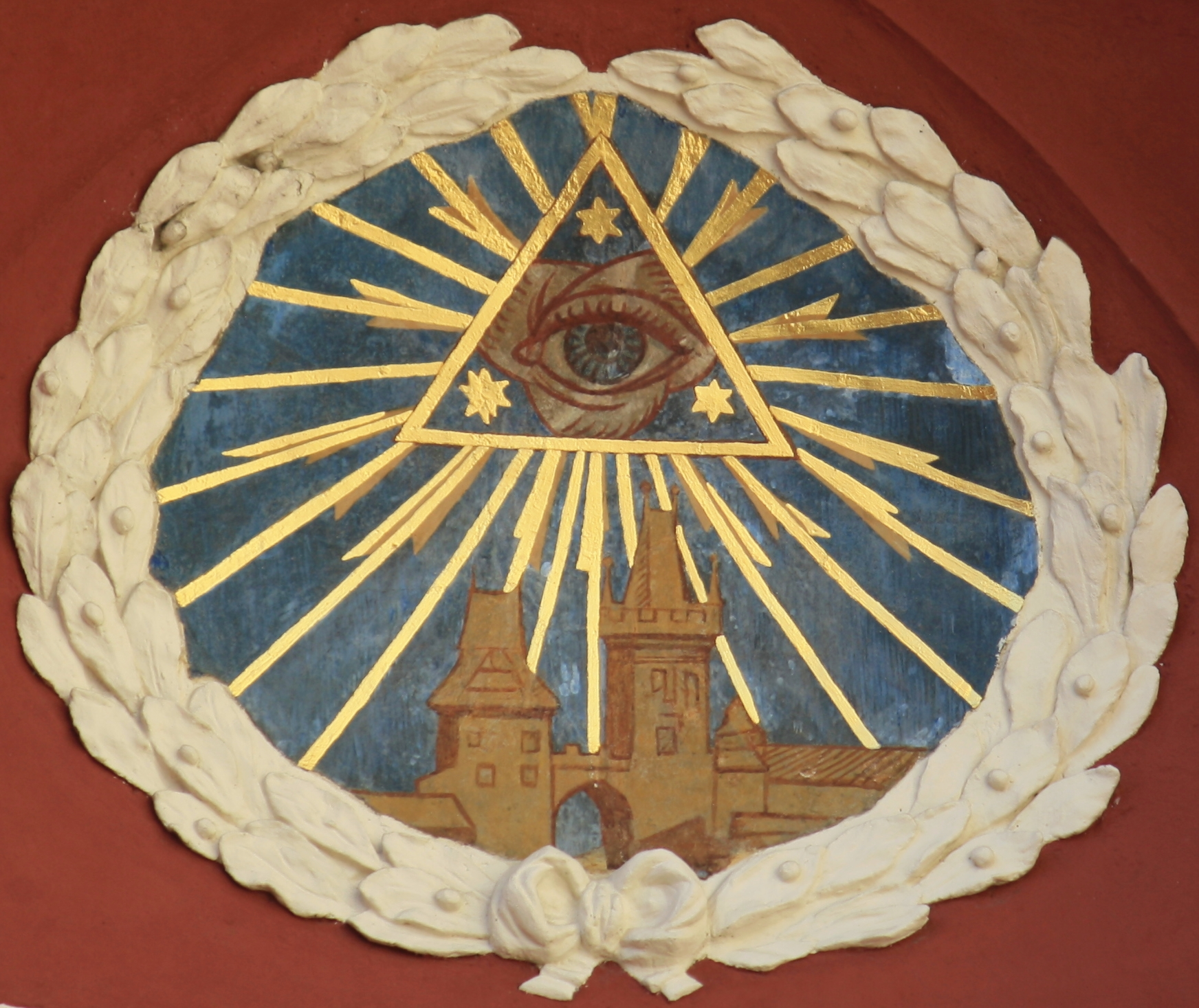 Praha, Staré Město - domovní znamení U Božího oka, dříve U Tří obrázků